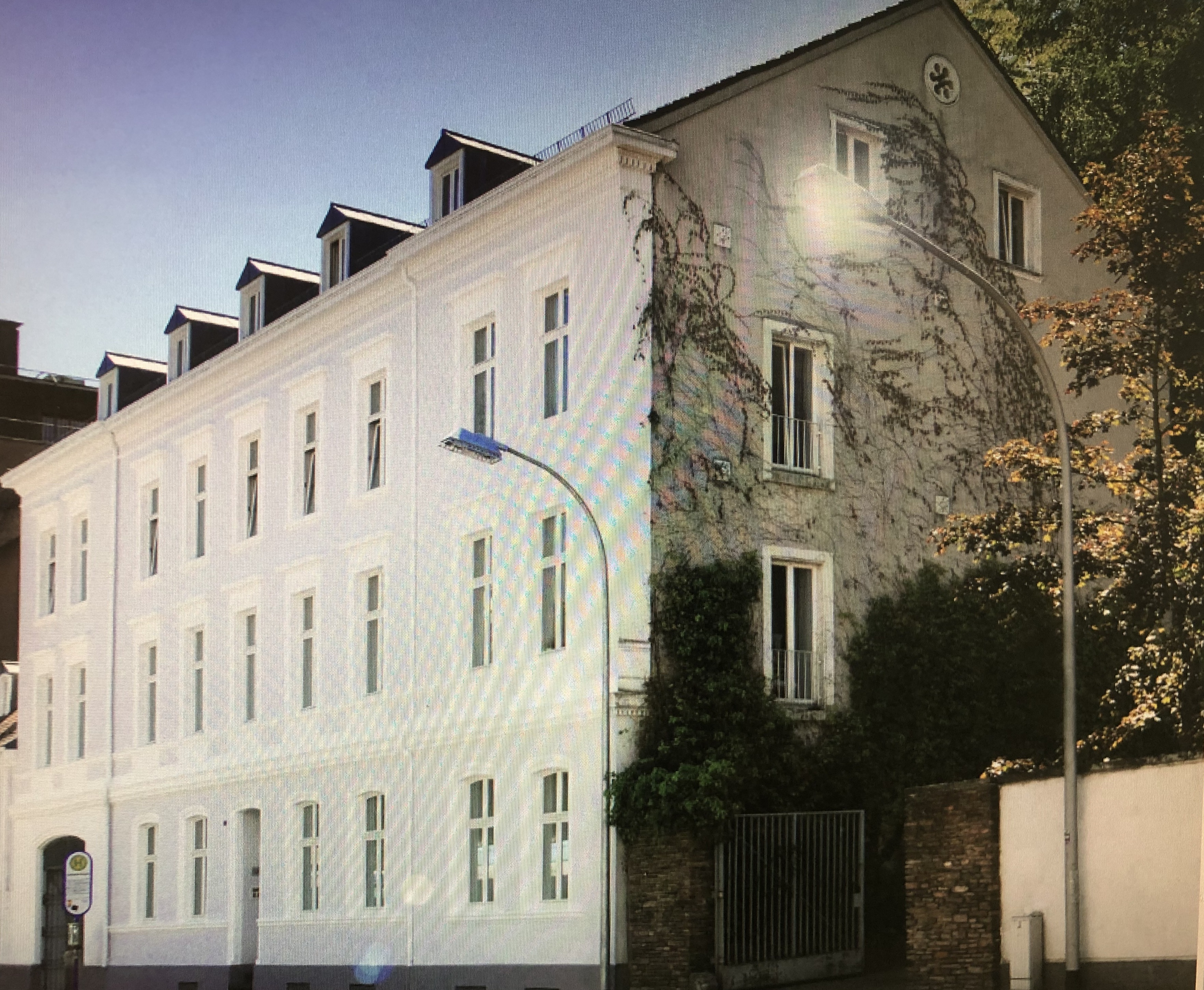 Talstraße 30 Saarbrücken